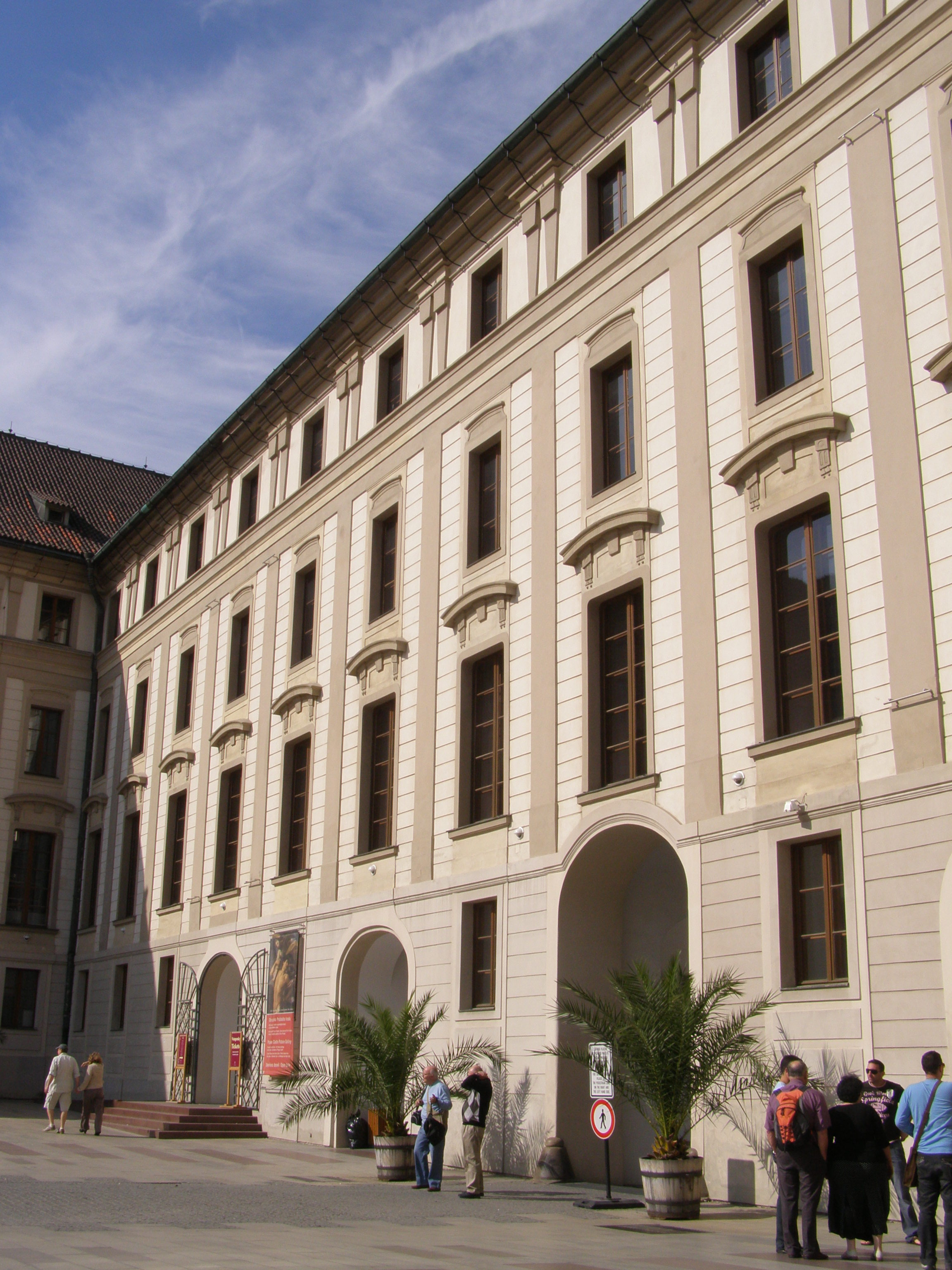 Pražský hrad, 2. hradní nádvoří